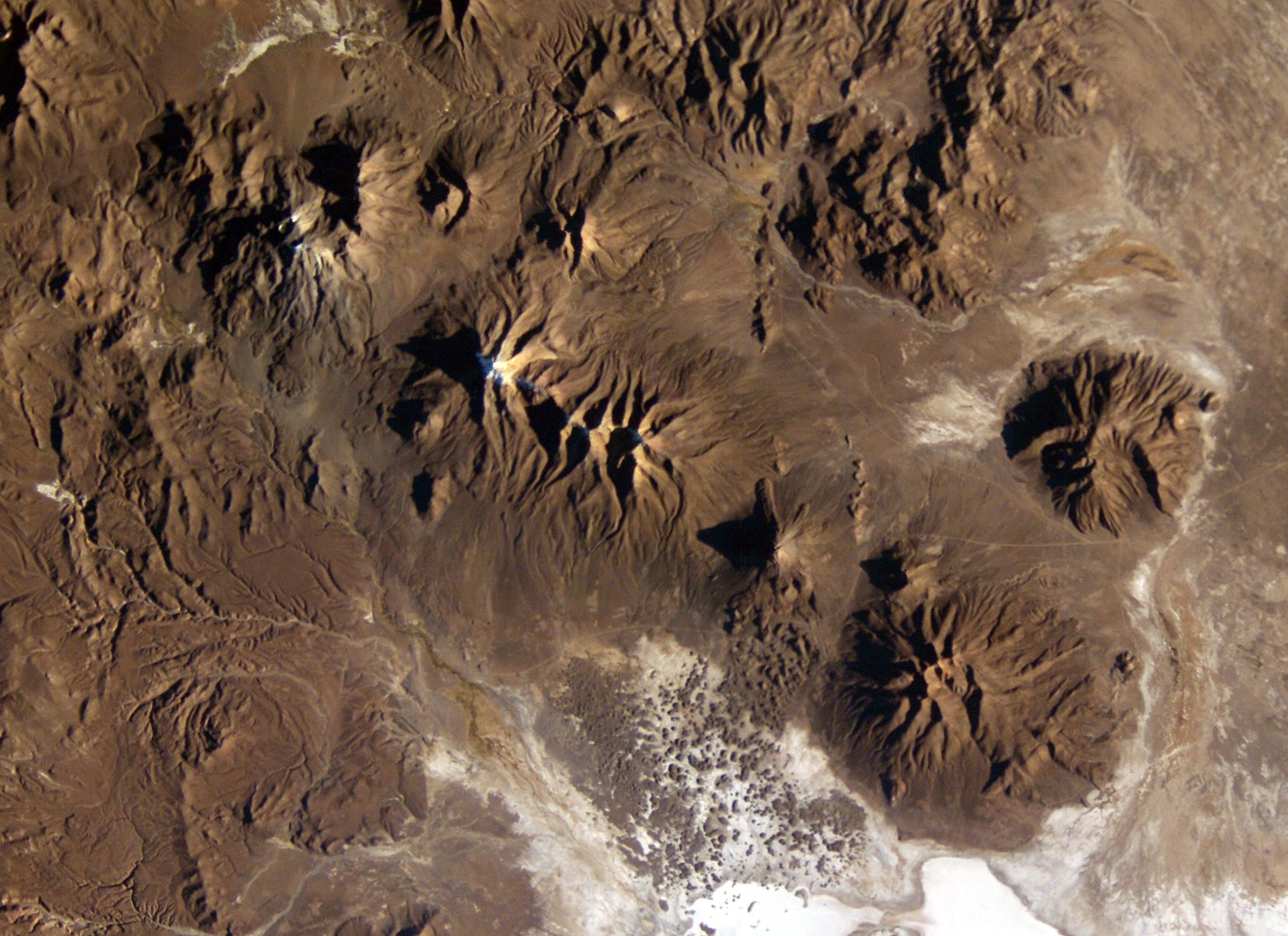 Image of Cabaray